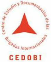 Centro de Estudios y Documentación de las Brigadas Internacionales